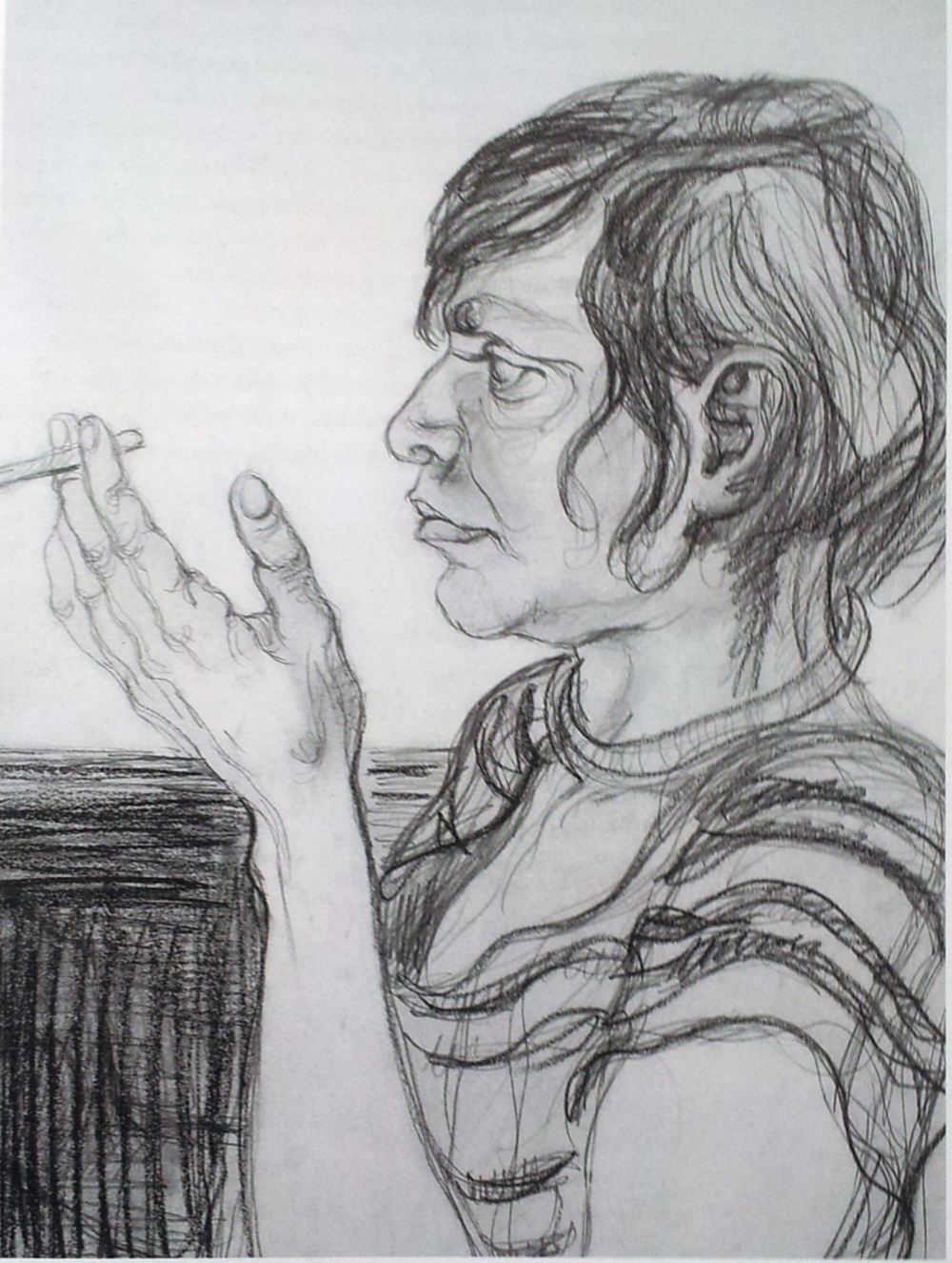 Selbstporträt mit Zigarette. Pastellkreide über Bleistift, 53,9 × 39,9 cm, Nachlass Elfriede Lohse-Wächtler Zeichnung aus der Serie "Friedrichsberger Köpfe", entstanden in der Psychiatrischen Anstalt Friedrichsberg in Hamburg.